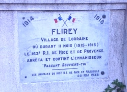 Plaque dédiée au 163ème R.I. à Nice, avenue de Flirey.